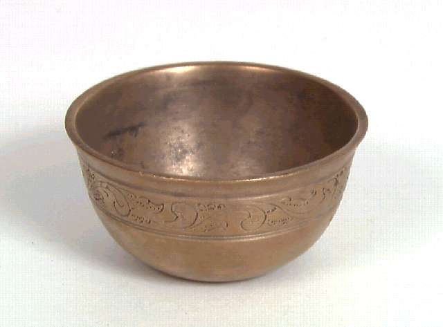 Tumling støpt i bronse med gravert dekor. Fra Bolsøy i Molde, Møre og Romsdal.